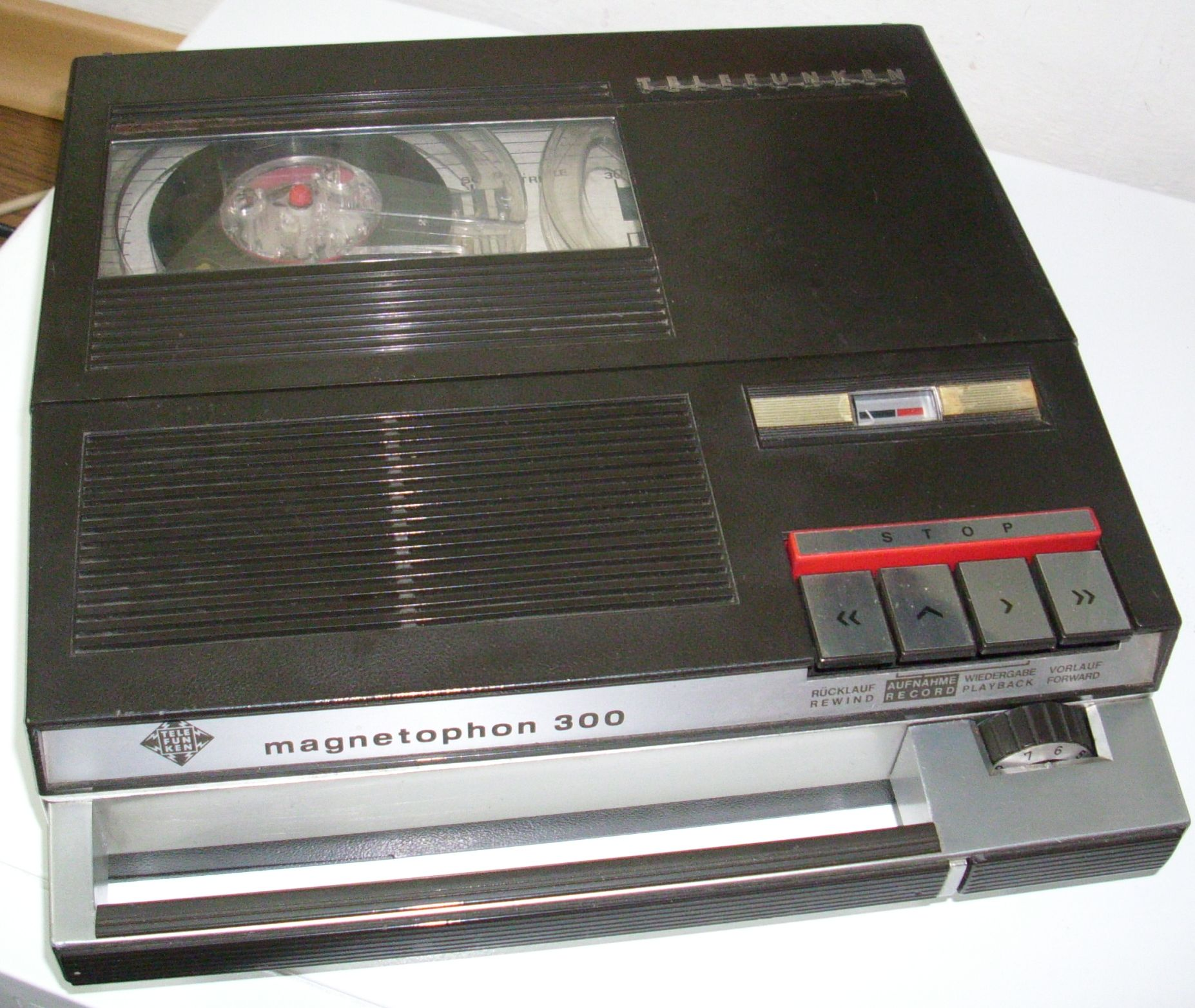 Es ist mein eigenes Tonbandgerät